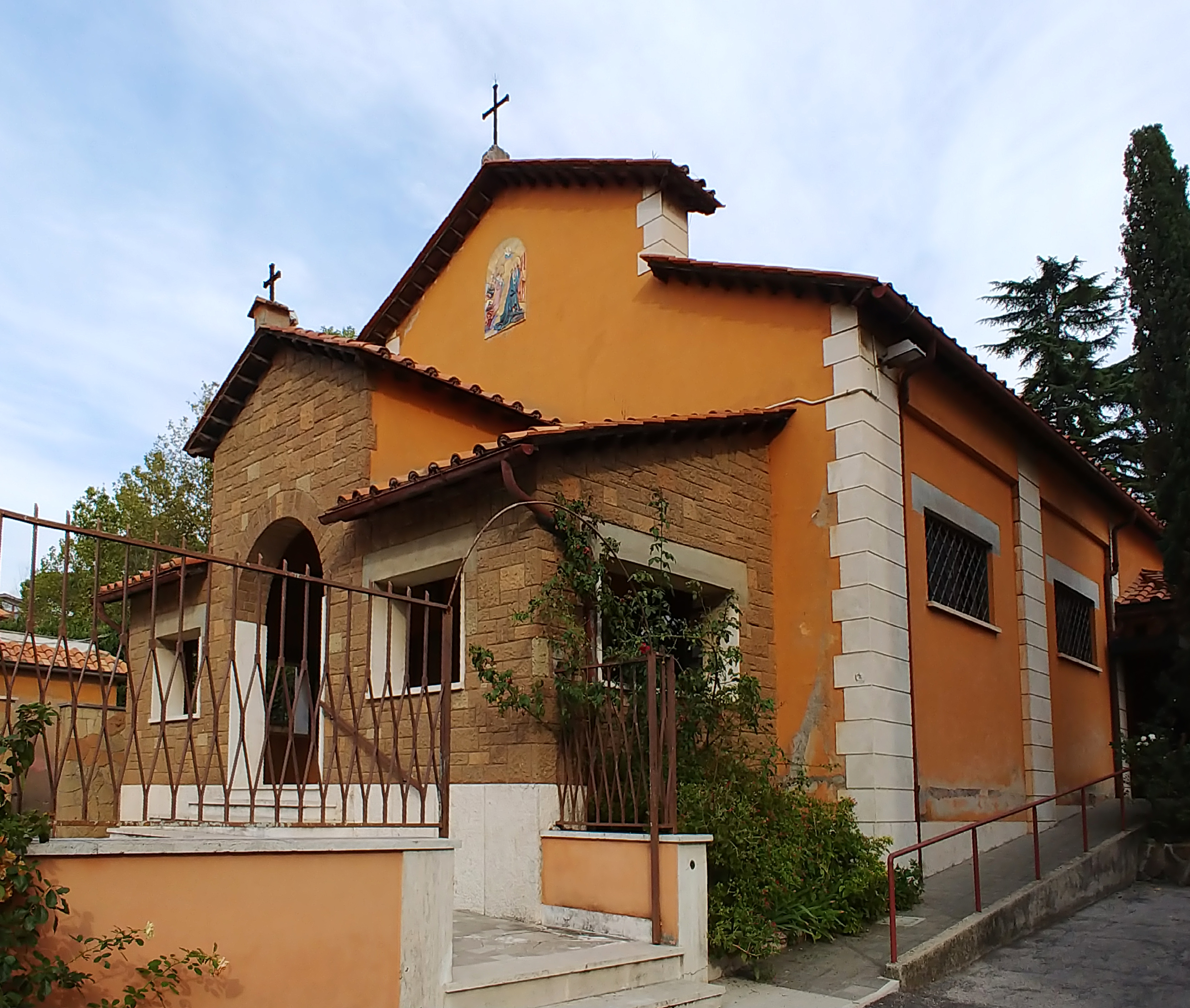 Esterno.